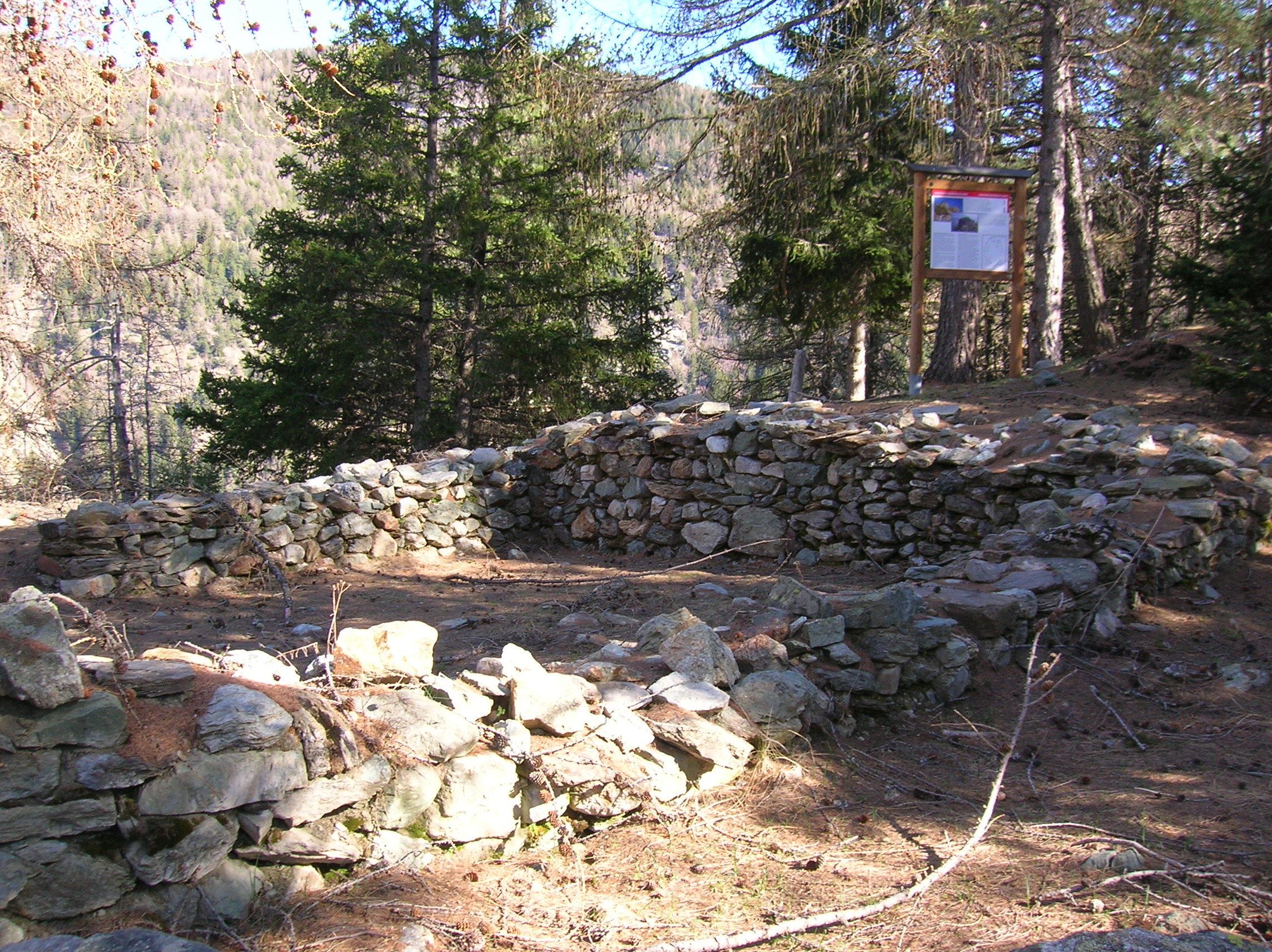 Castelliere inferiore di Lignan, comune di Nus, Valle d'Aosta, Italia.